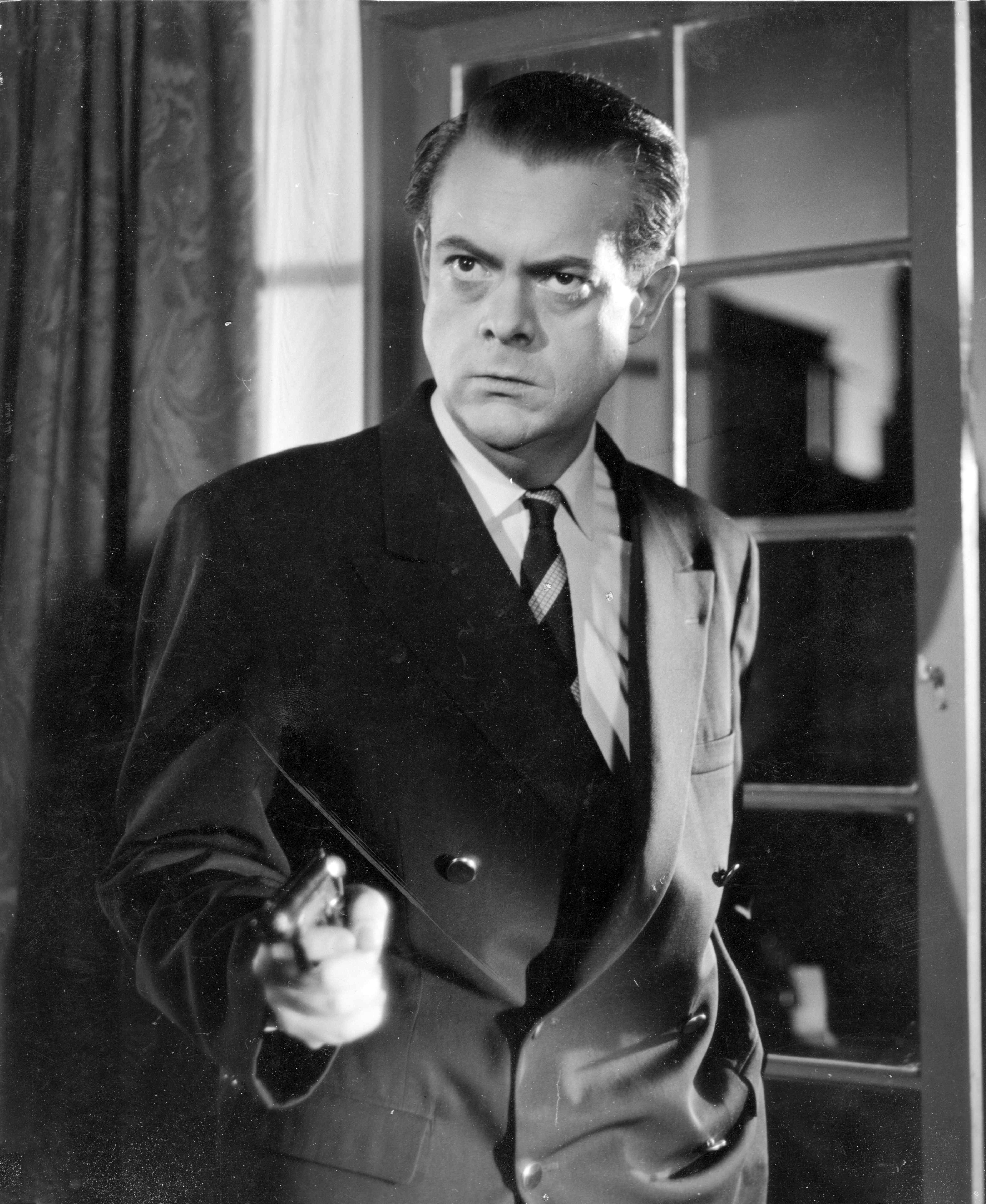 Skådespelaren Åke Falck (1925–1974) i huvudrollen som Jerk Domare i filmen Tärningen är kastad (1960).